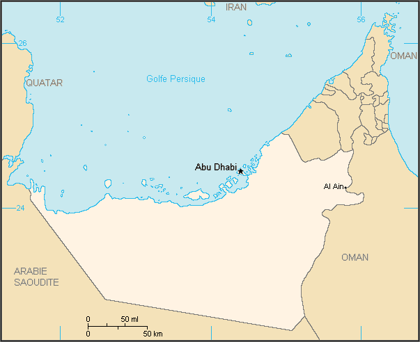 Carte de l'émirat d'Abu Dhabi,Emirats arabes unis